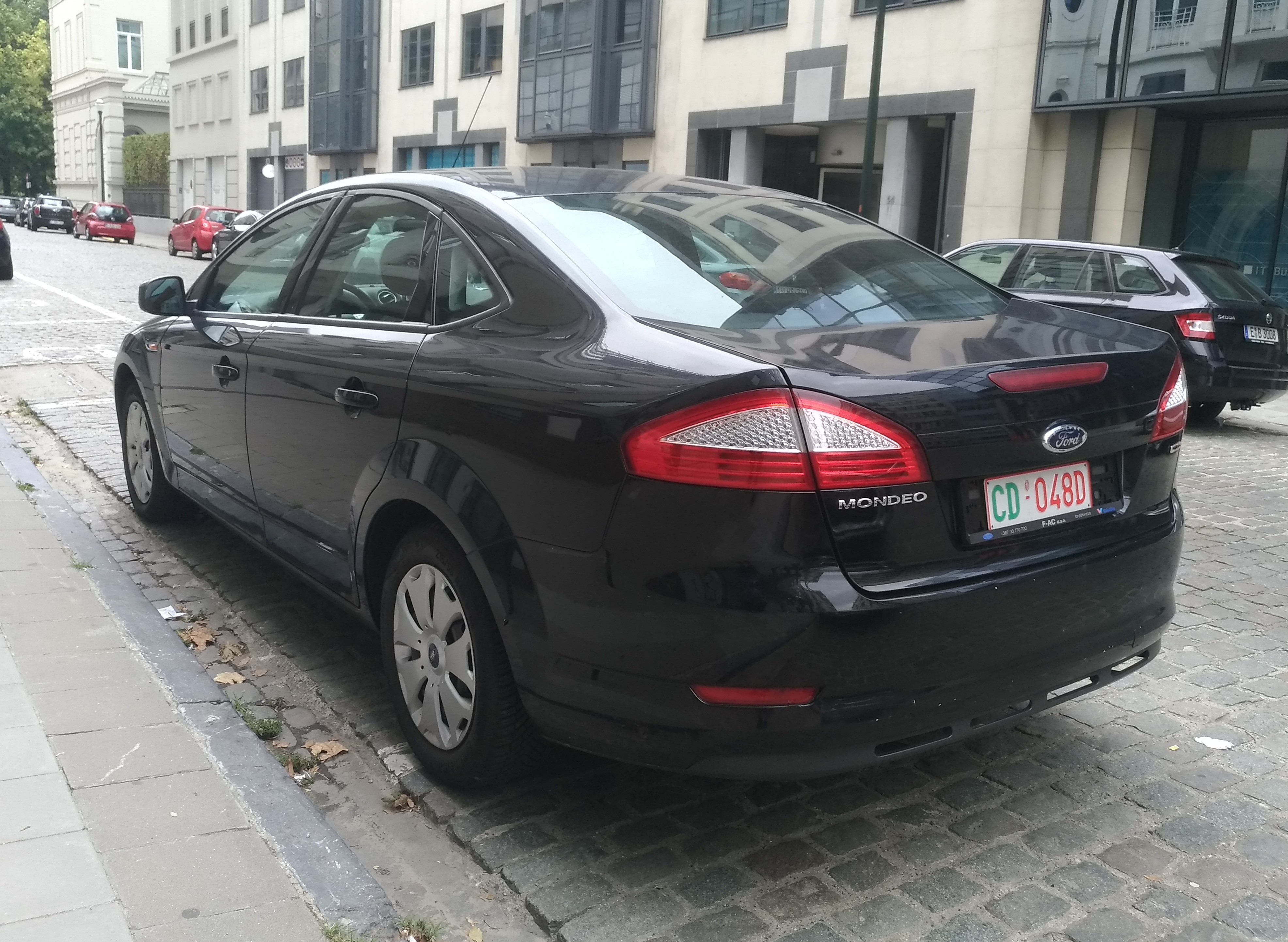 Ford Mondeo Belgium Diplomatic plate